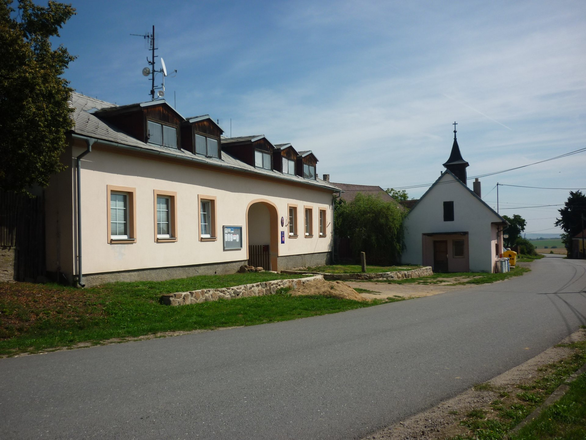 Obecní úřad v Županovicích